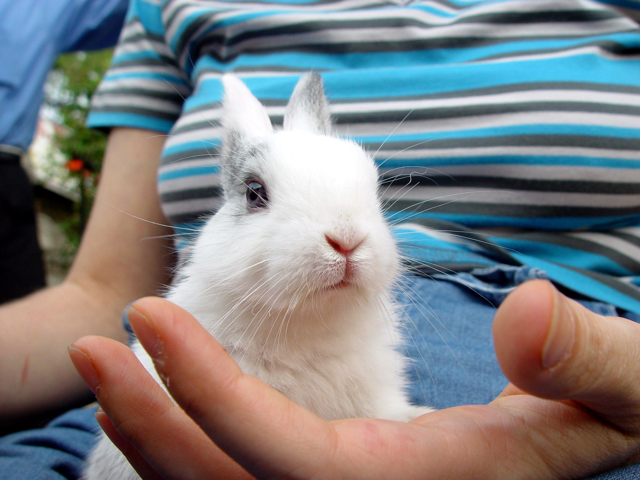 Rabbit